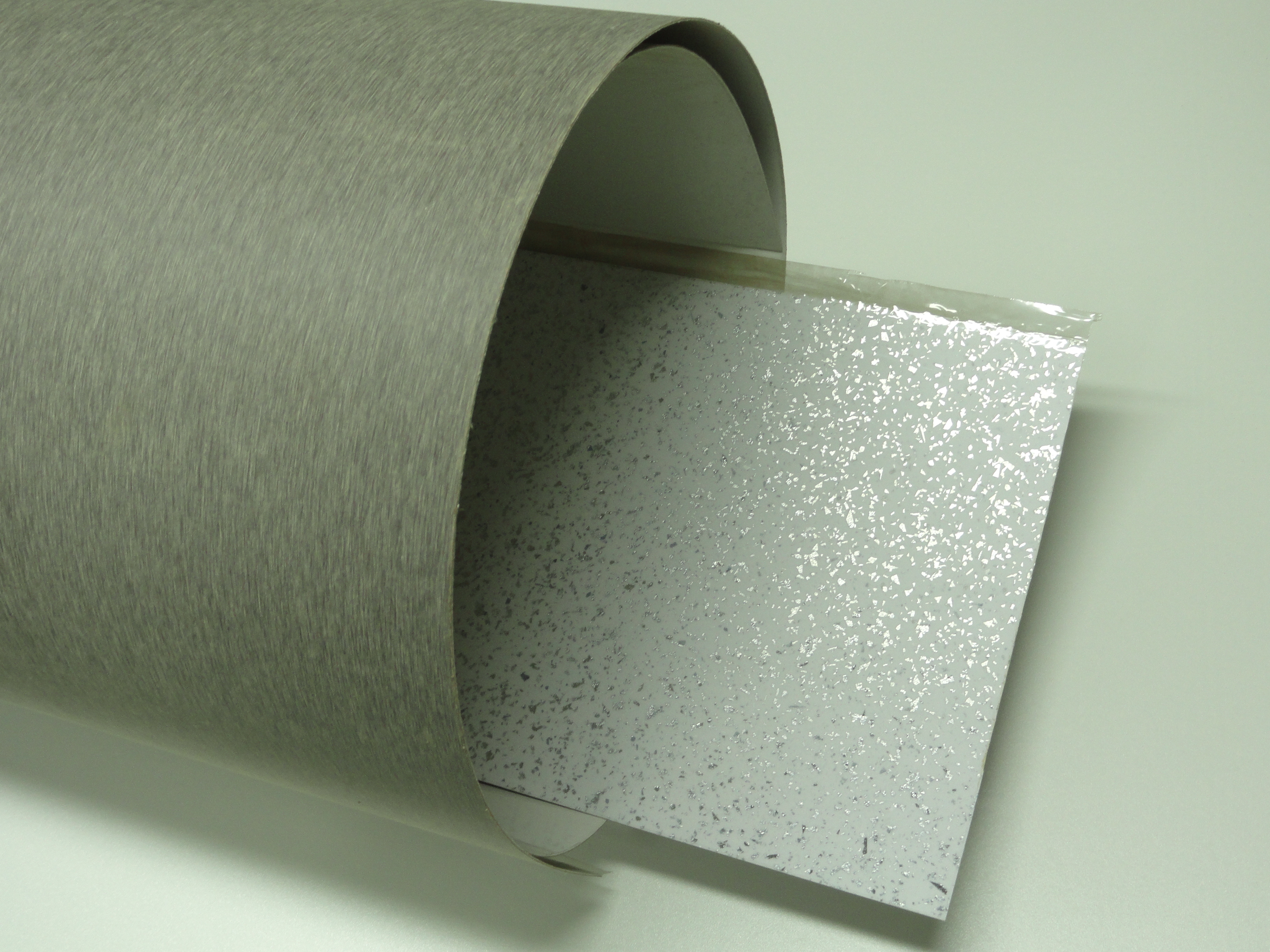 Декоративный бумажно-слоистый пластик ДБСП Decorative HPLaminate